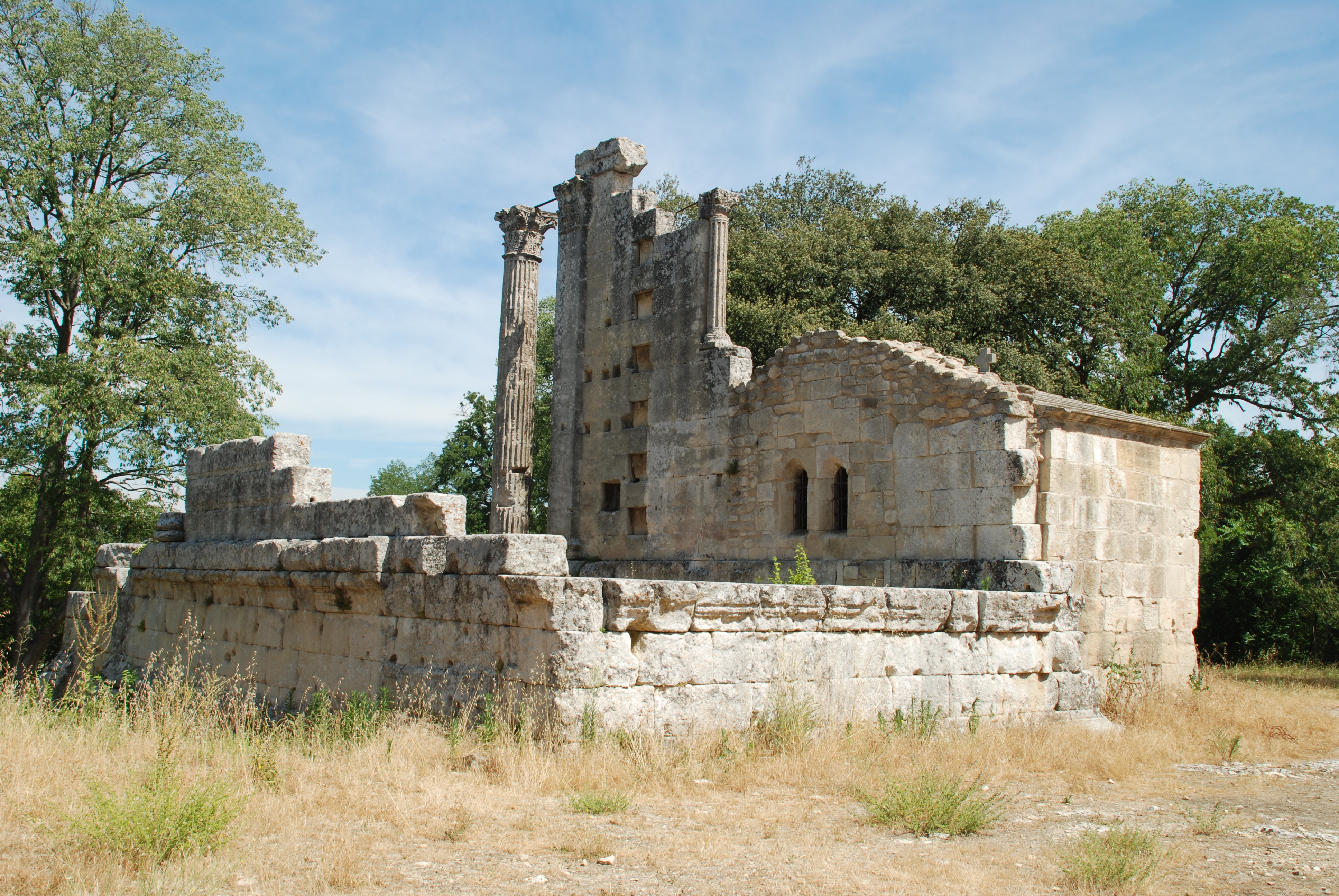 France - Provence - Chapelle Saint-Cézaire de Château-Bas